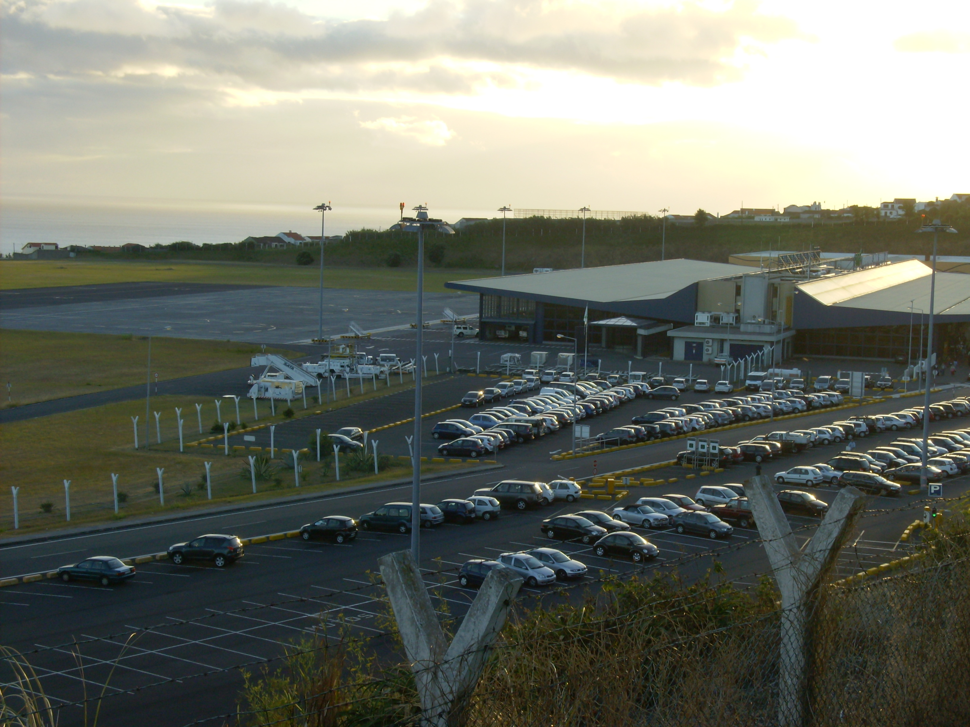 Aeroporto João Paulo II, cidade e concelho de Ponta Delgada, Açores.